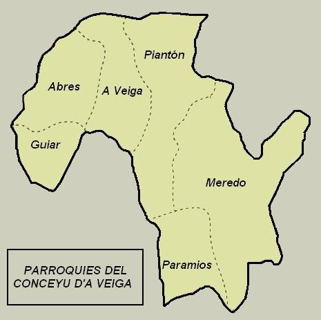 parroquies d'A veiga